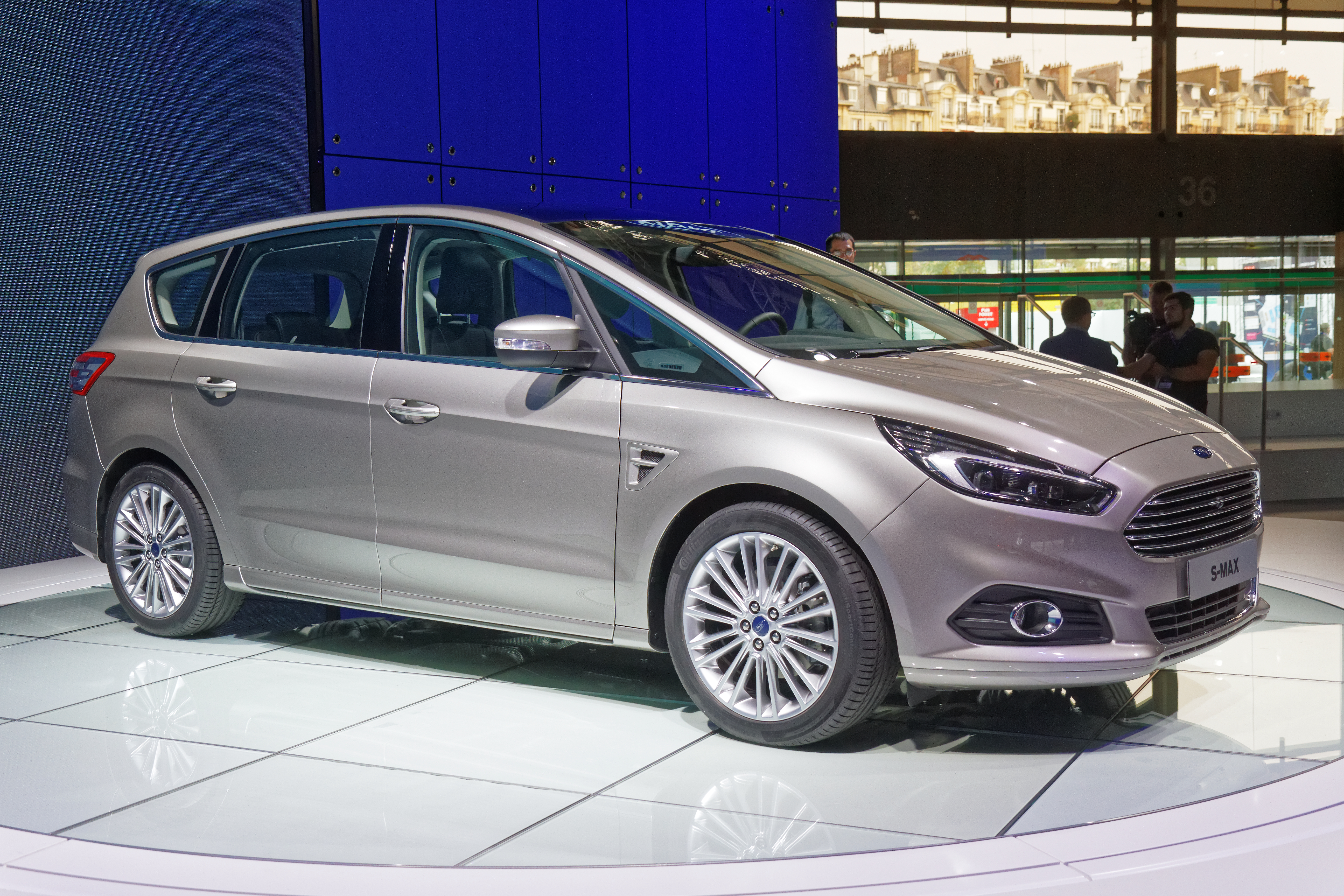 Une Ford S-Max présentée lors du mondial de l'automobile de Paris 2014.